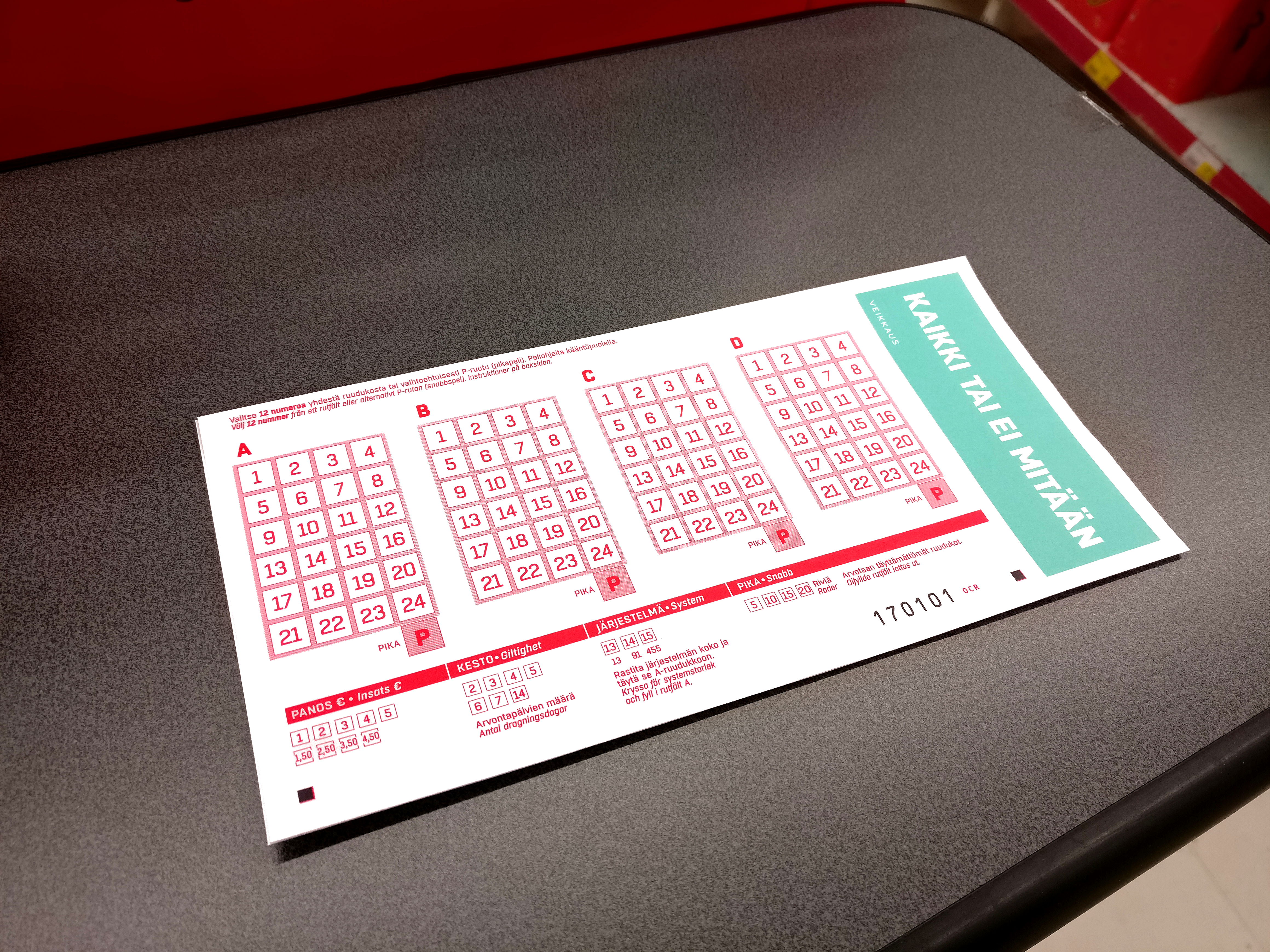 Veikkauksen Kaikki tai ei mitään -pelin pelikuponki.